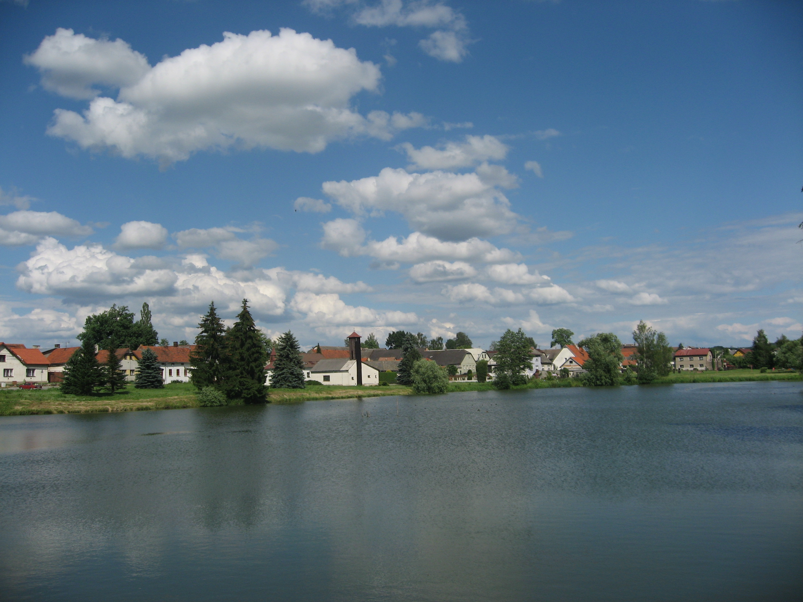 Dobronín